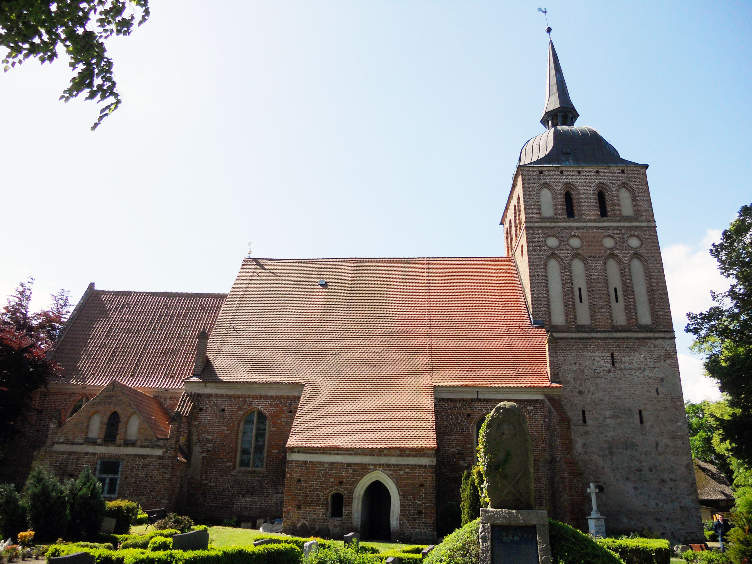 Außenansicht der Katharinenkirche in Trent, Rügen